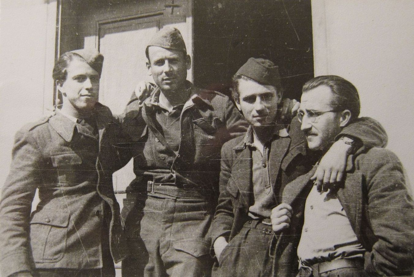 Pred grafičnim slikarskim ateljejem v Črmošnjicah - od leve proti desni: akademski slikar Ive Šubic, ing. arh. Branko Simčič, Ivan Melik-Gojmir in ing. arh. Ignac Gregorač, revija Borec.